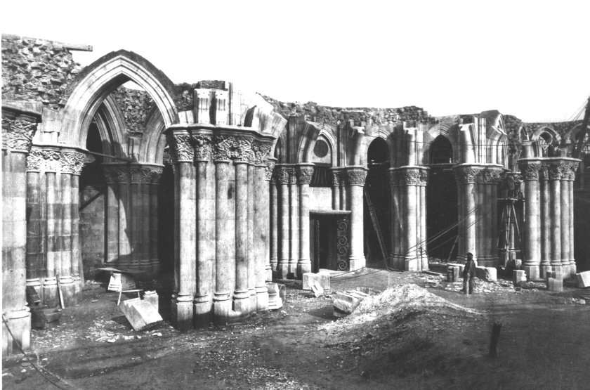 Obras de la cripta de la Sagrada Familia (1886).